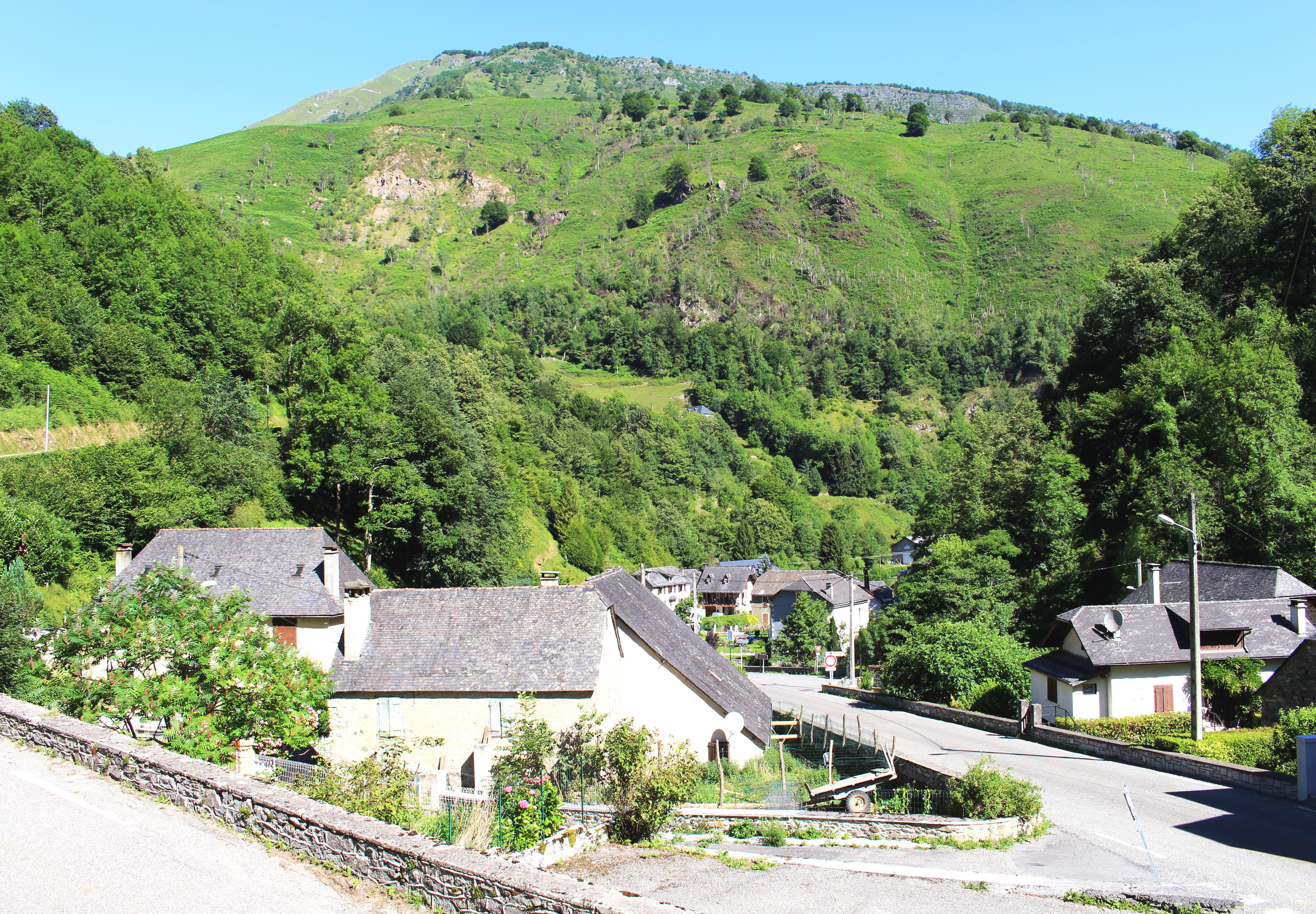 Arbéost (Hautes-Pyrénées)